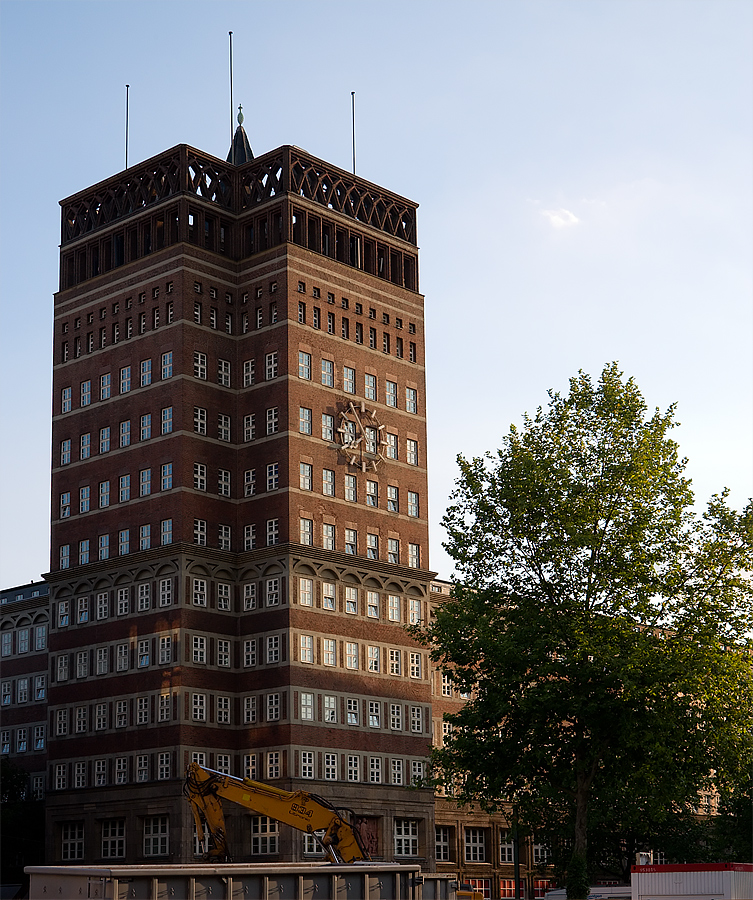 Wilhelm-Marx-Haus Düsseldorf. Architekt: Wilhelm Kreis